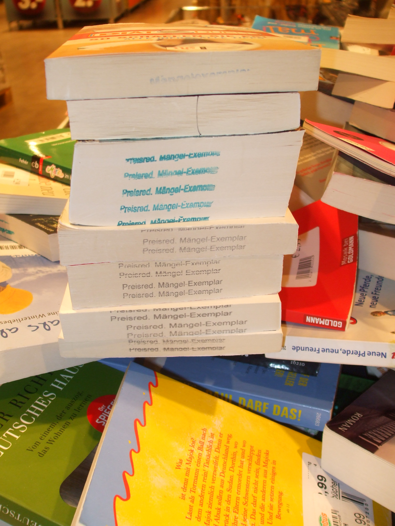 Stempel: Preisred. Mängelexemplar auf einem Wühltisch